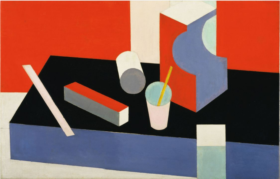 Painting